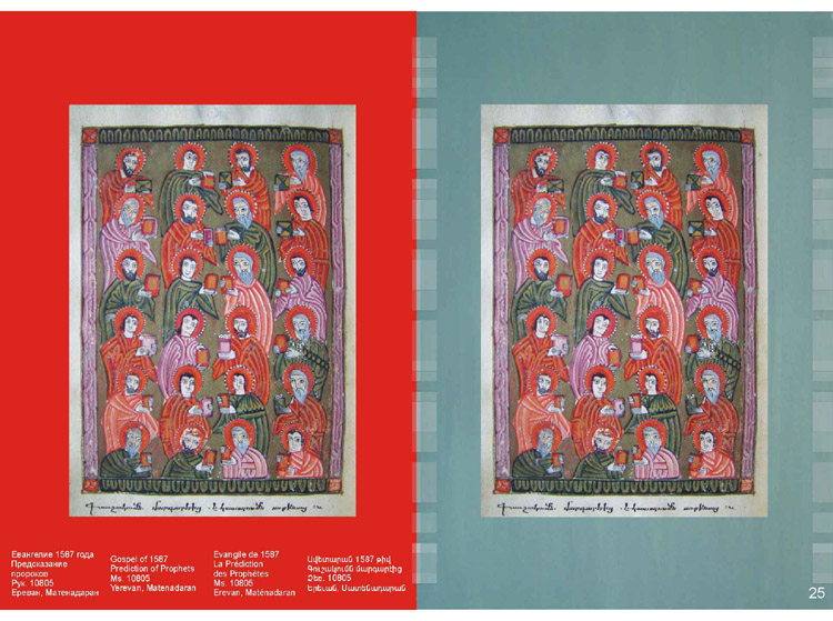 Առաքել Գեղամեցի